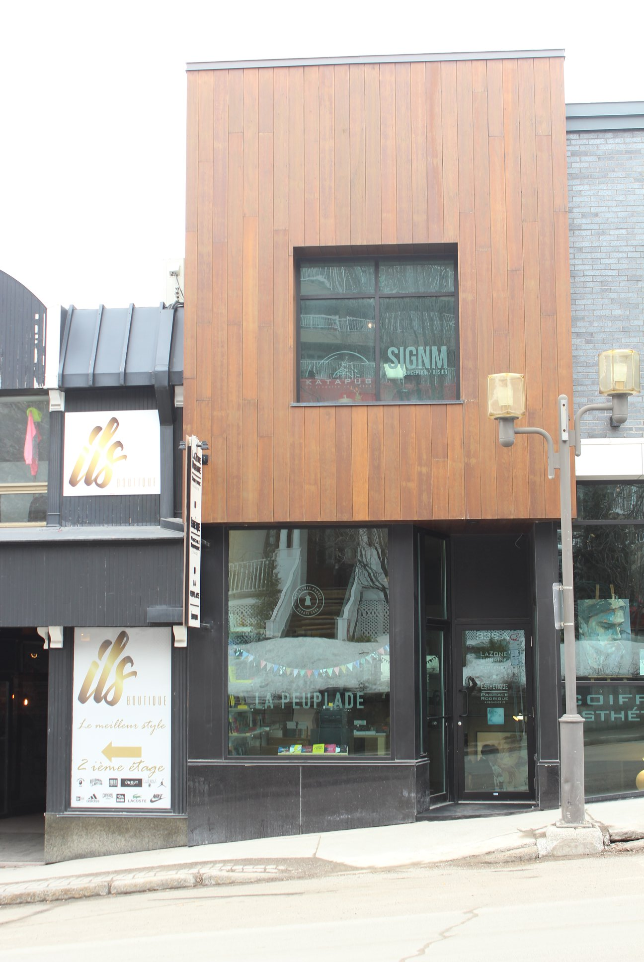 La Peuplade, maison d'édition, vue extérieure.